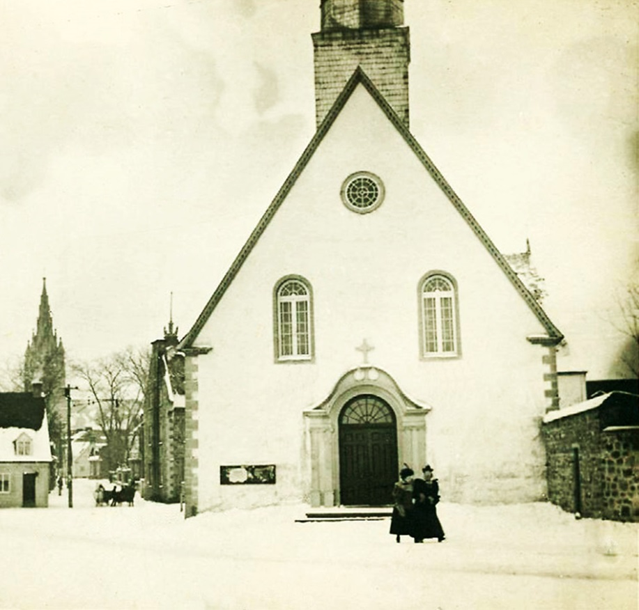 Troisième église paroissiale de Trois-Rivières, construite en 1710 et disparue en 1908, sur le site de l'actuel Sacré-Coeur, vers 1906.